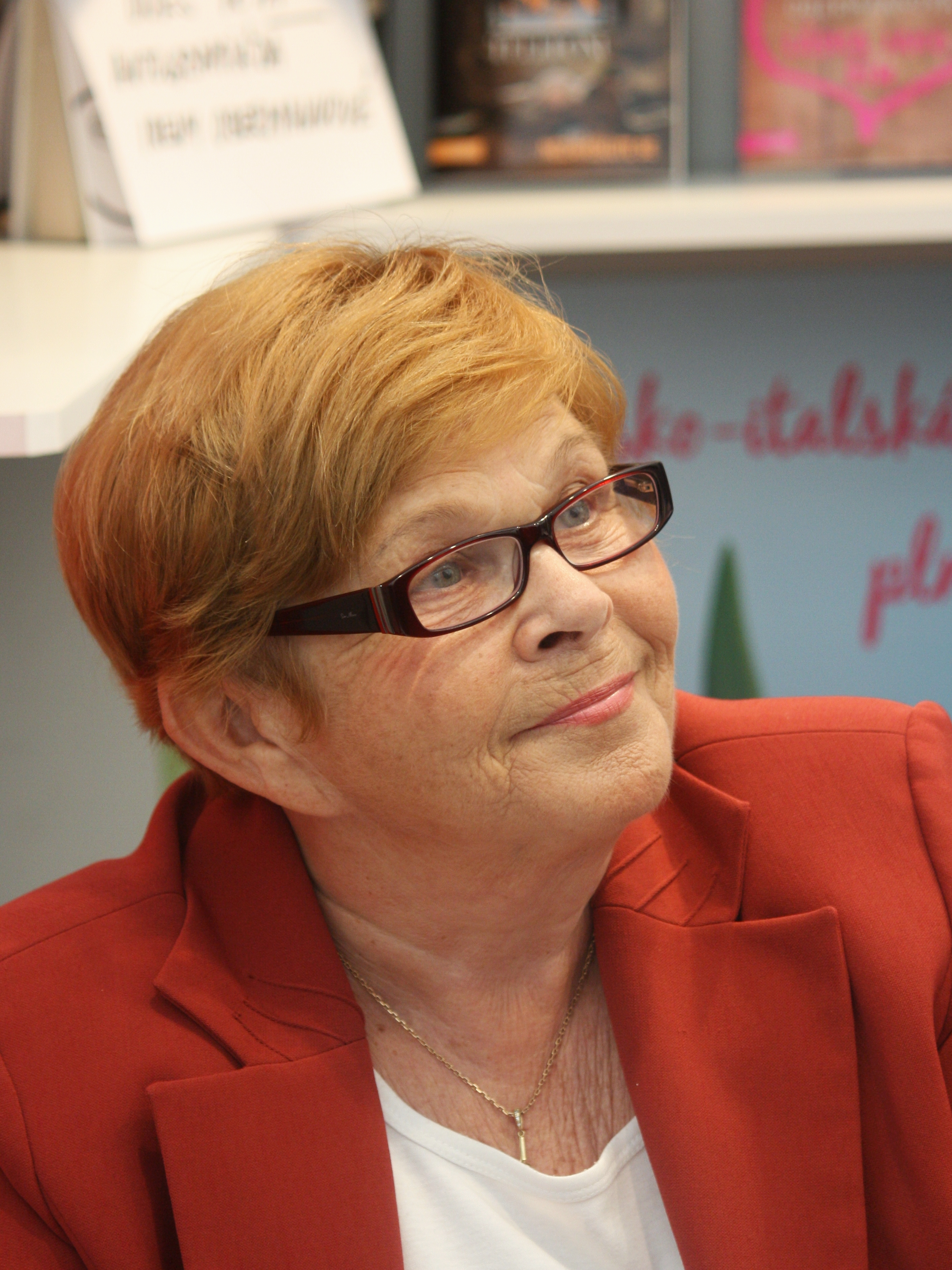 Ivanka Devátá na 17. mezinárodním knižním veletrhu Svět knihy v Praze Personality rights warning Although this work is freely licensed or in the public domain, the person(s) shown may have rights that legally restrict certain re-uses unless those depicted consent to such uses. In these cases, a model release or other evidence of consent could protect you from infringement claims.